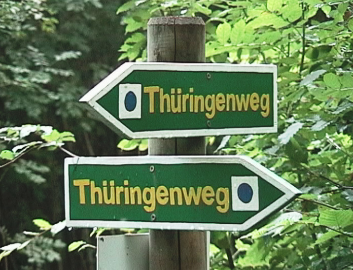 1998 in Jena